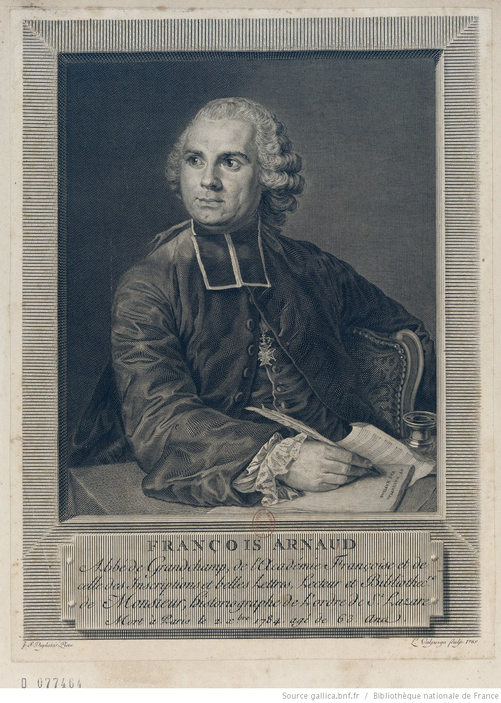 portrait de l'abbé François Arnaud, philologue et académicien français - inscription : "J.S. Duplessis, pinx. ; L. Valperga, sculp., 1785"